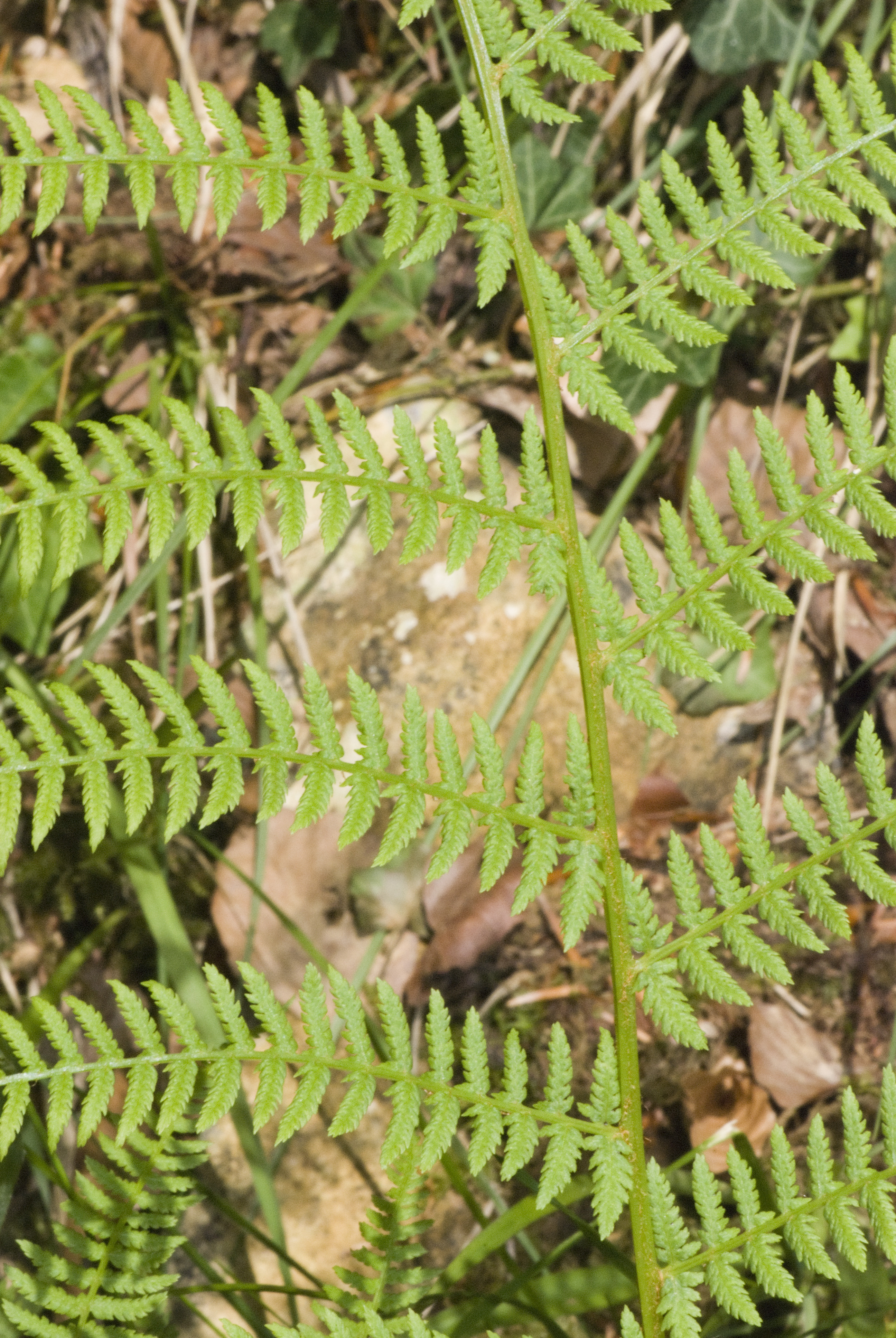 Athyrium filix-femina Forêt d'Eu (Seine Maritime), France